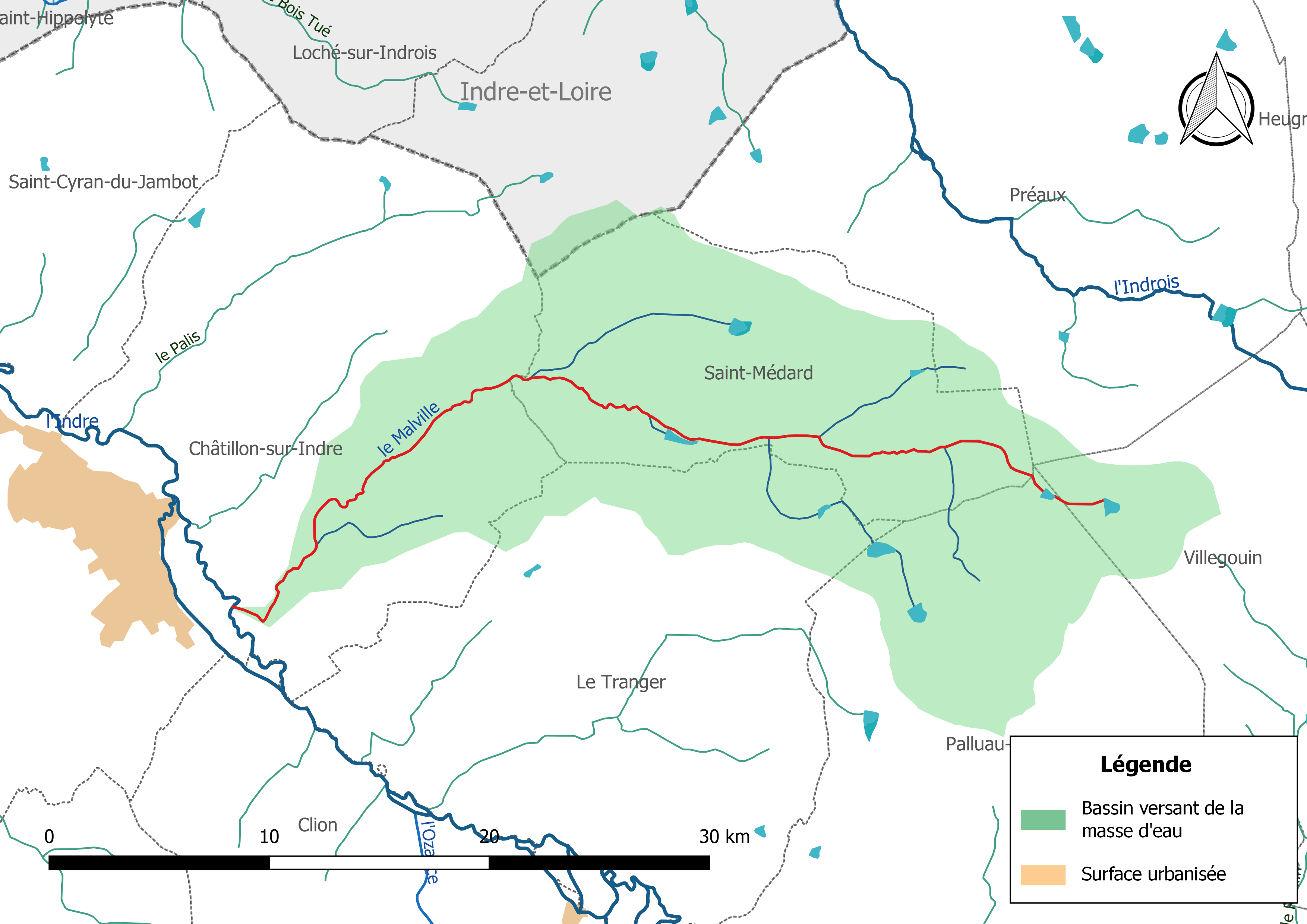 Carte de la masse d'eau « FRGR2059 », avec mise en exergue du cours d'eau « le Malville » (en rouge).